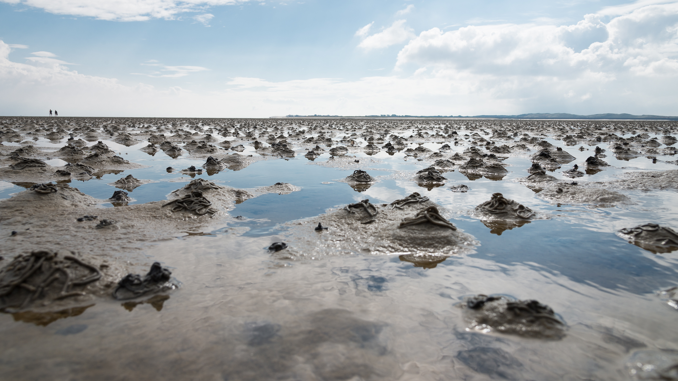 „Haufen“ des Wattwurms (Arenicola marina) im Wattenmeer bei List auf Sylt, Nordsee; Bereich im Nationalpark Schleswig-Holsteinisches Wattenmeer